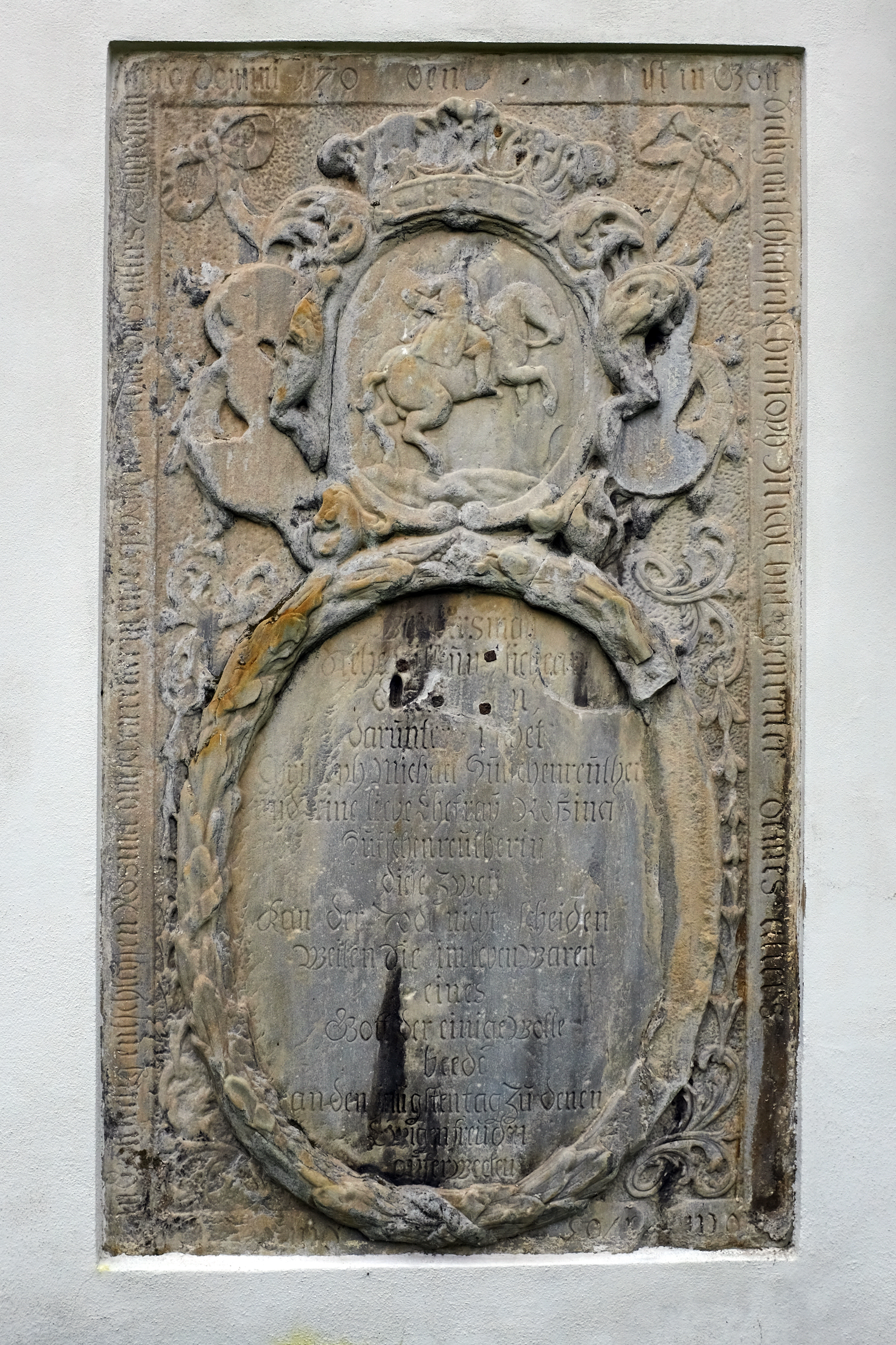 Kostel svatého Martina, Jindřichovice (okres Sokolov).